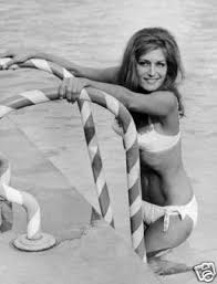 Dalida à Rome en 1965